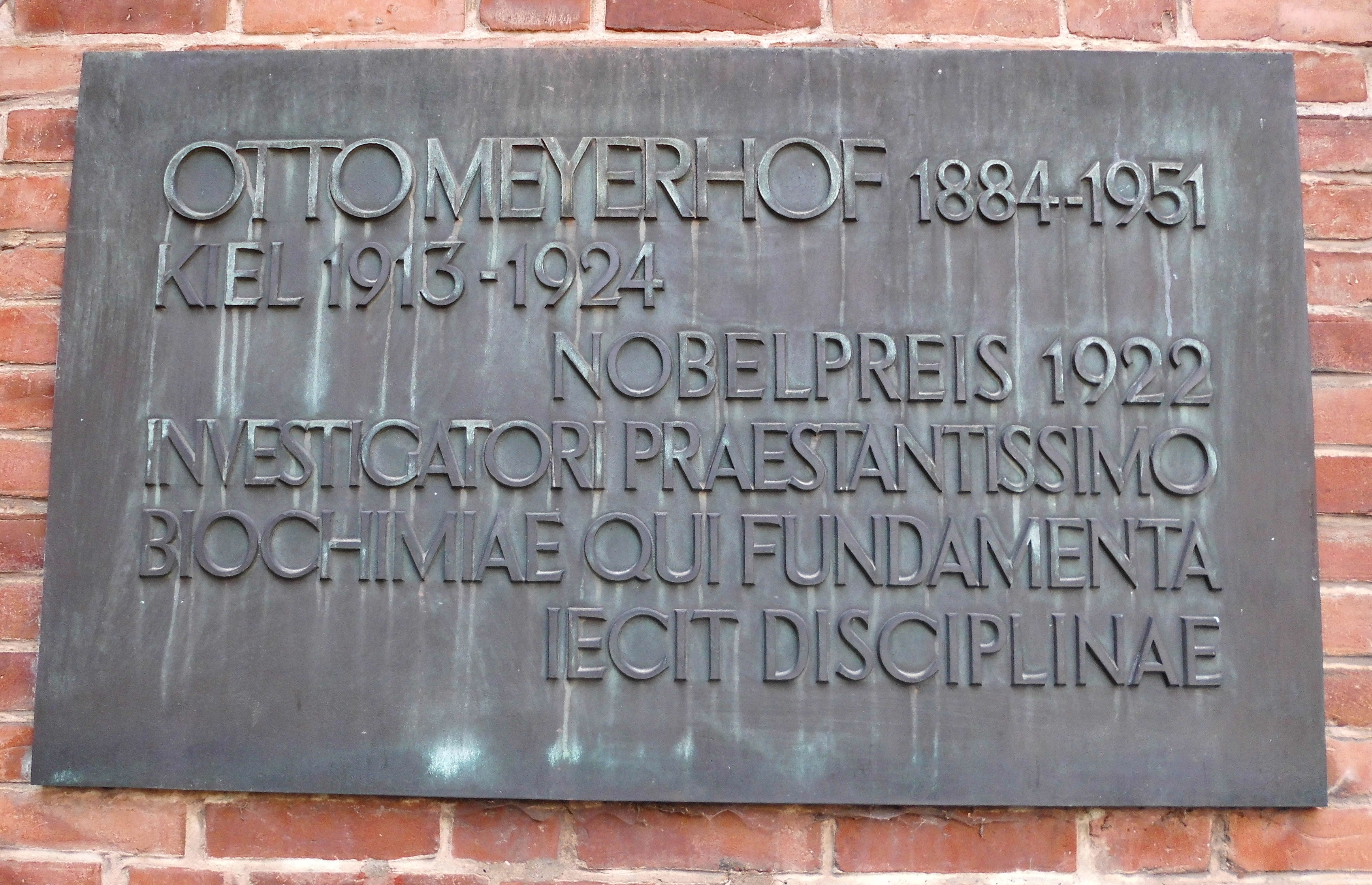 Gedenkplakette (Detail) an der Fassade des Universitäts-Gebäudes Rudolf-Höber-Straße 1-2 im Kieler Stadtteil Ravensberg. Siehe auch Gesamtaufnahme.